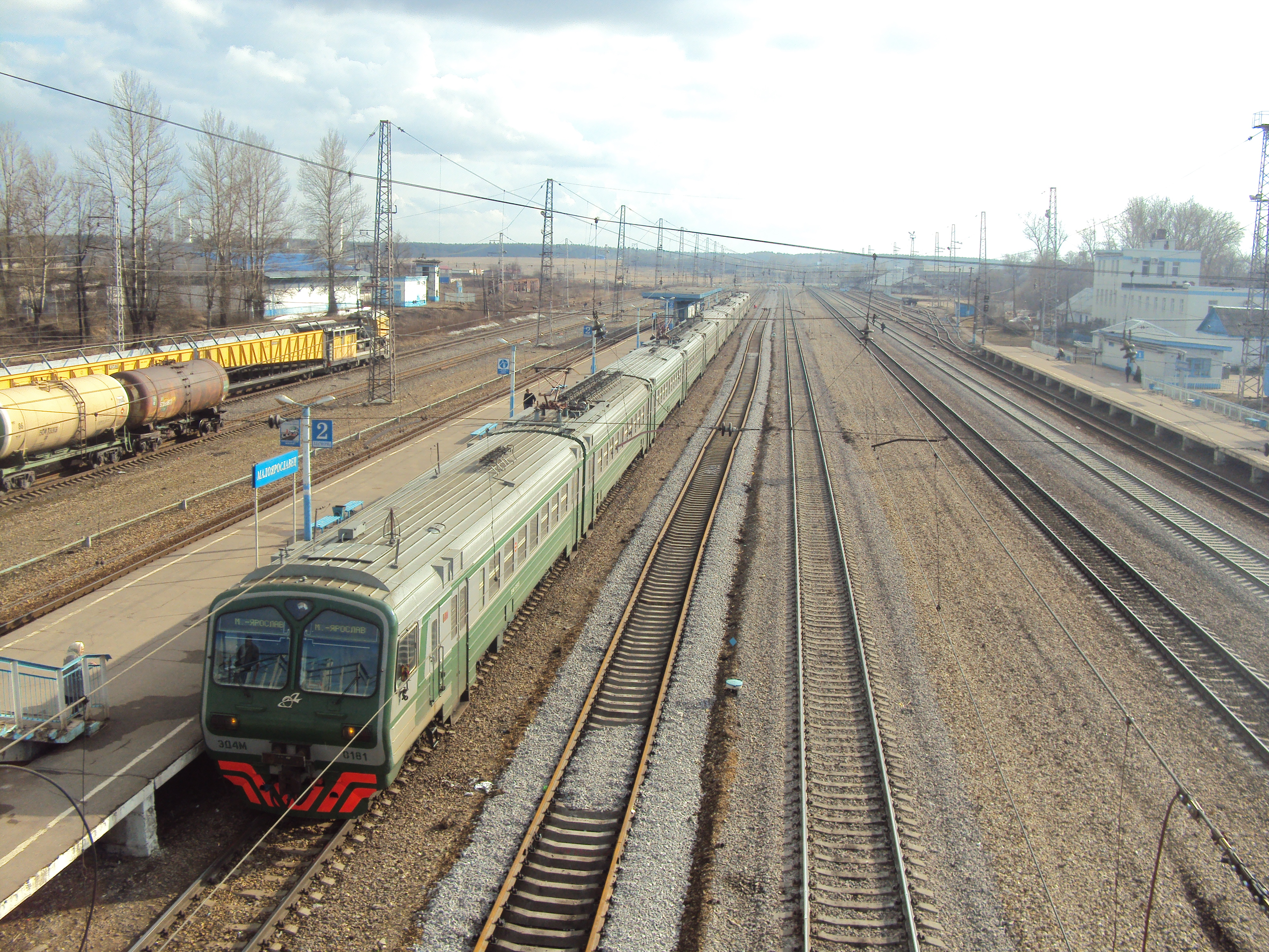 Малоярославец (станция)